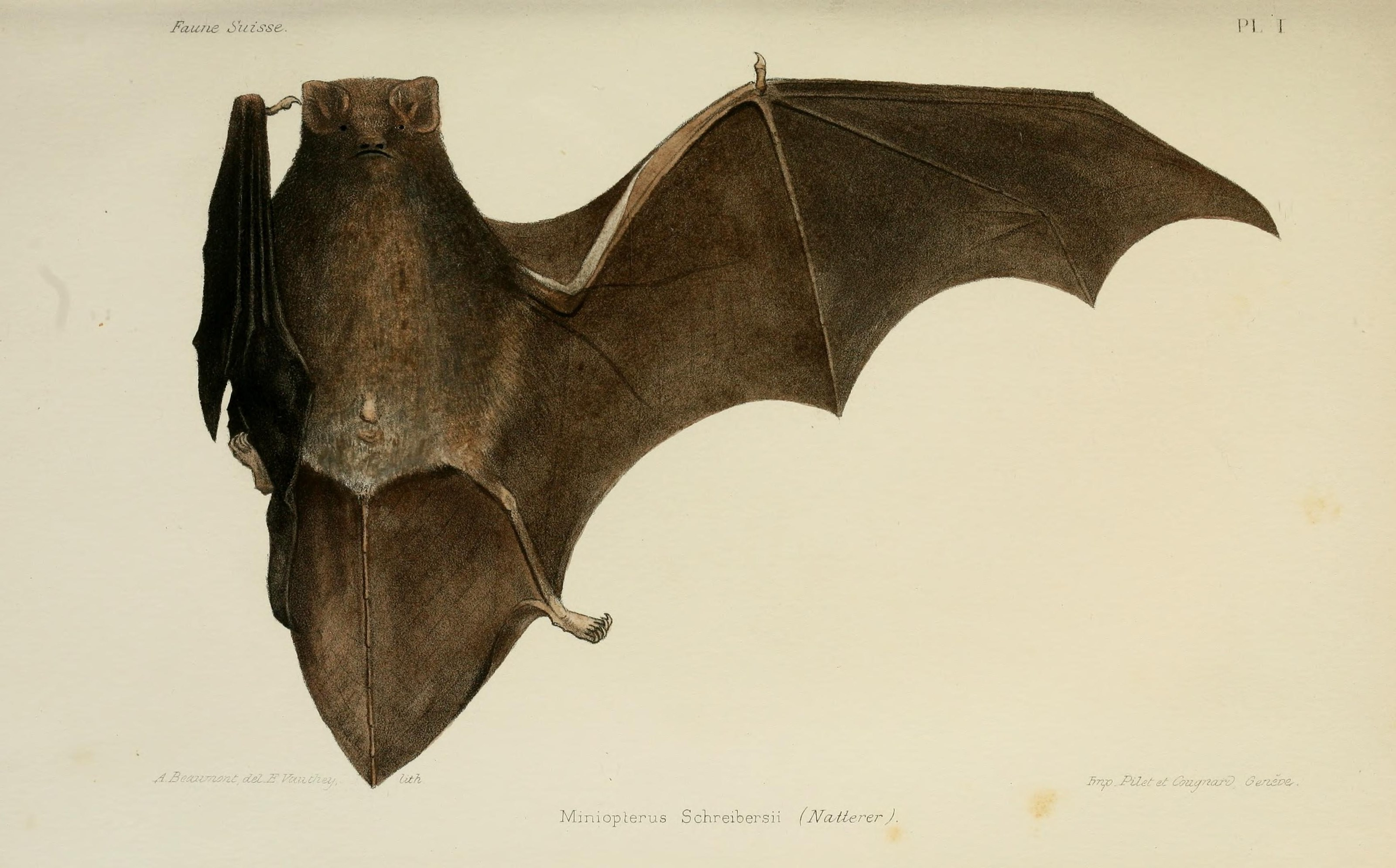 Faune des vertébrés de la Suisse v.1 HALLOWEEN